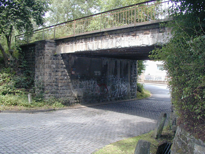 Ruhrtalbahn: Unterführung in Witten-Bommern zwischen Uferstraße (Hintergrund) und Bleichestraße/Im Klive (Vordergrund)